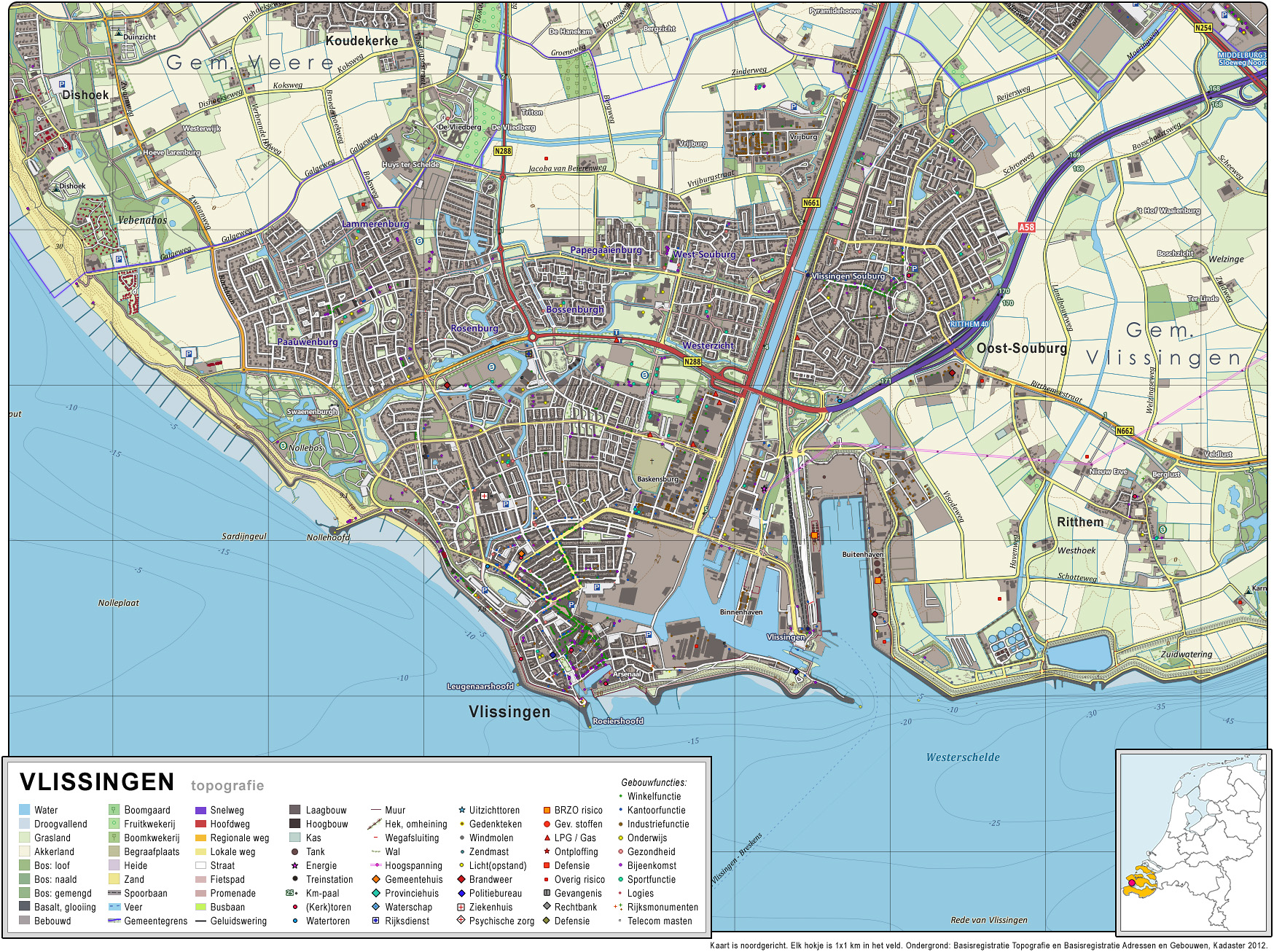 Topografisch beeld van de stad Vlissingen. Op basis van de GML open geodata van de BRT/Top10NL (basisregistratie Topografie, Kadaster 2012), vrijgegeven door Kadaster op 30-11-2012 onder de Creative Commons BY licentie. Gebouwvlakken vanuit Open Geodata BAG extract (december 2012). Samenstelling en kleurenschema: Jan-Willem van Aalst, met QuantumGIS en Photoshop.